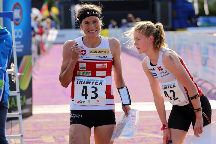 Sprint final 2013, WOC 2013, 20